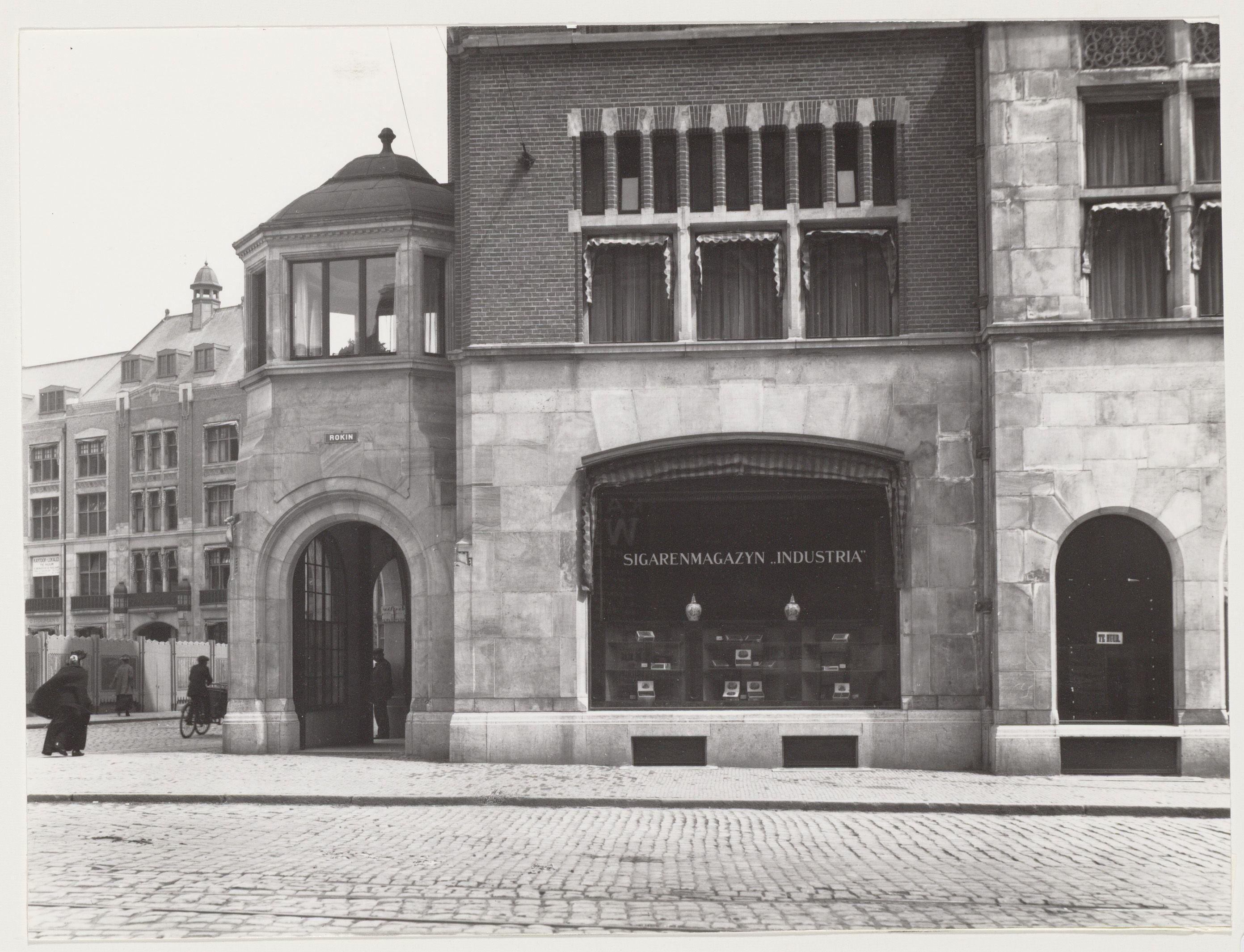 Beschrijving Rokin 1 Gebouw Industria, zijgevel aan het Rokin. Documenttype foto Vervaardiger Merkelbach, Atelier J. Collectie Collectie Atelier J. Merkelbach Datering 1916 Geografische naam Rokin Inventarissen Afbeeldingsbestand B00000002557 Generated with Dememorixer